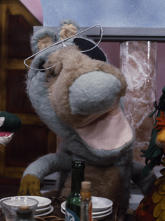 Woefdram uit de Fabeltjeskrant